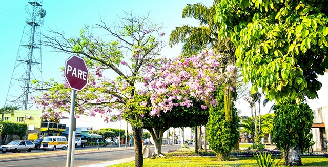 Praça dos Três Poderes